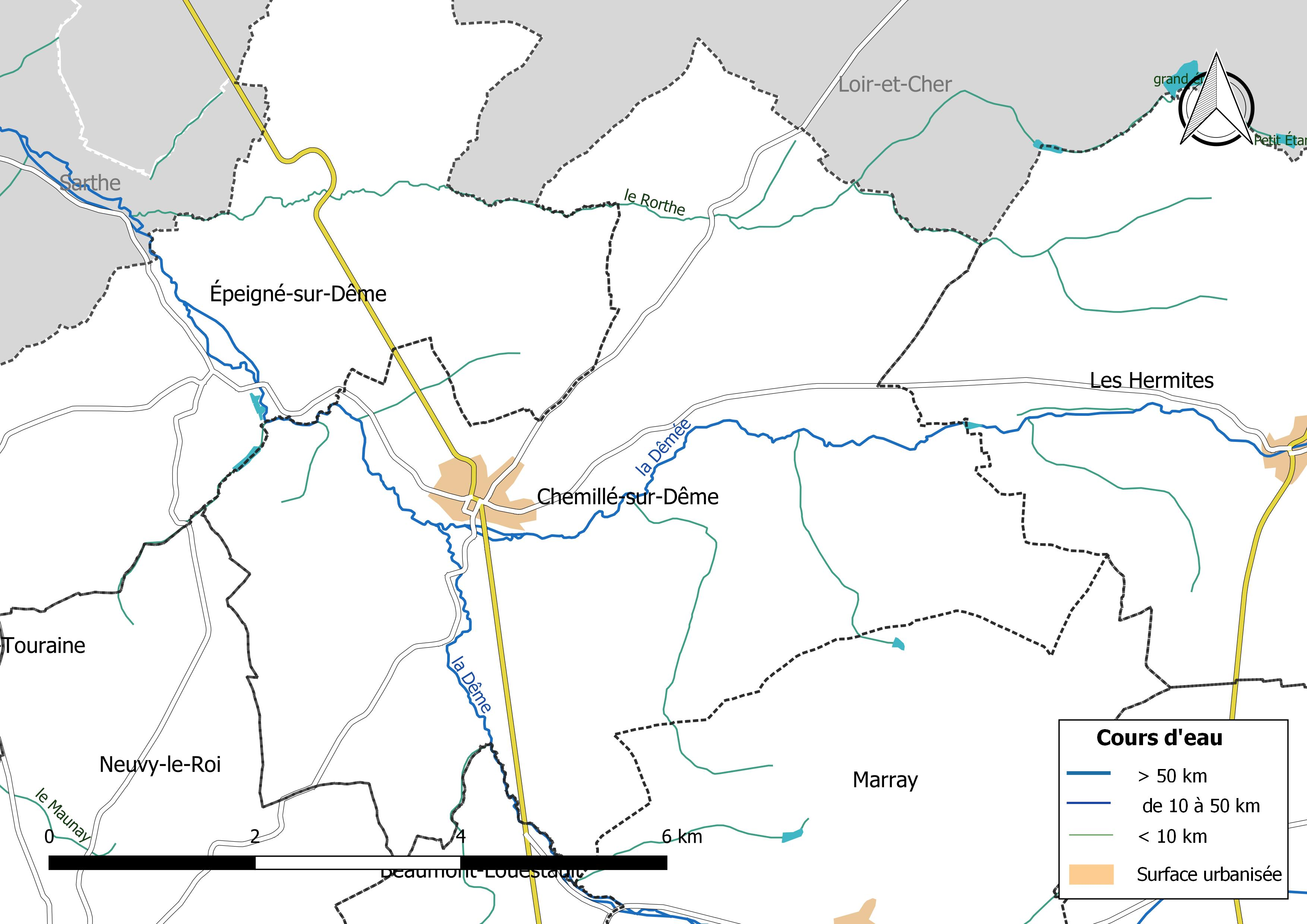 Carte du réseau hydrographique de la commune de Chemillé-sur-Dême (France).